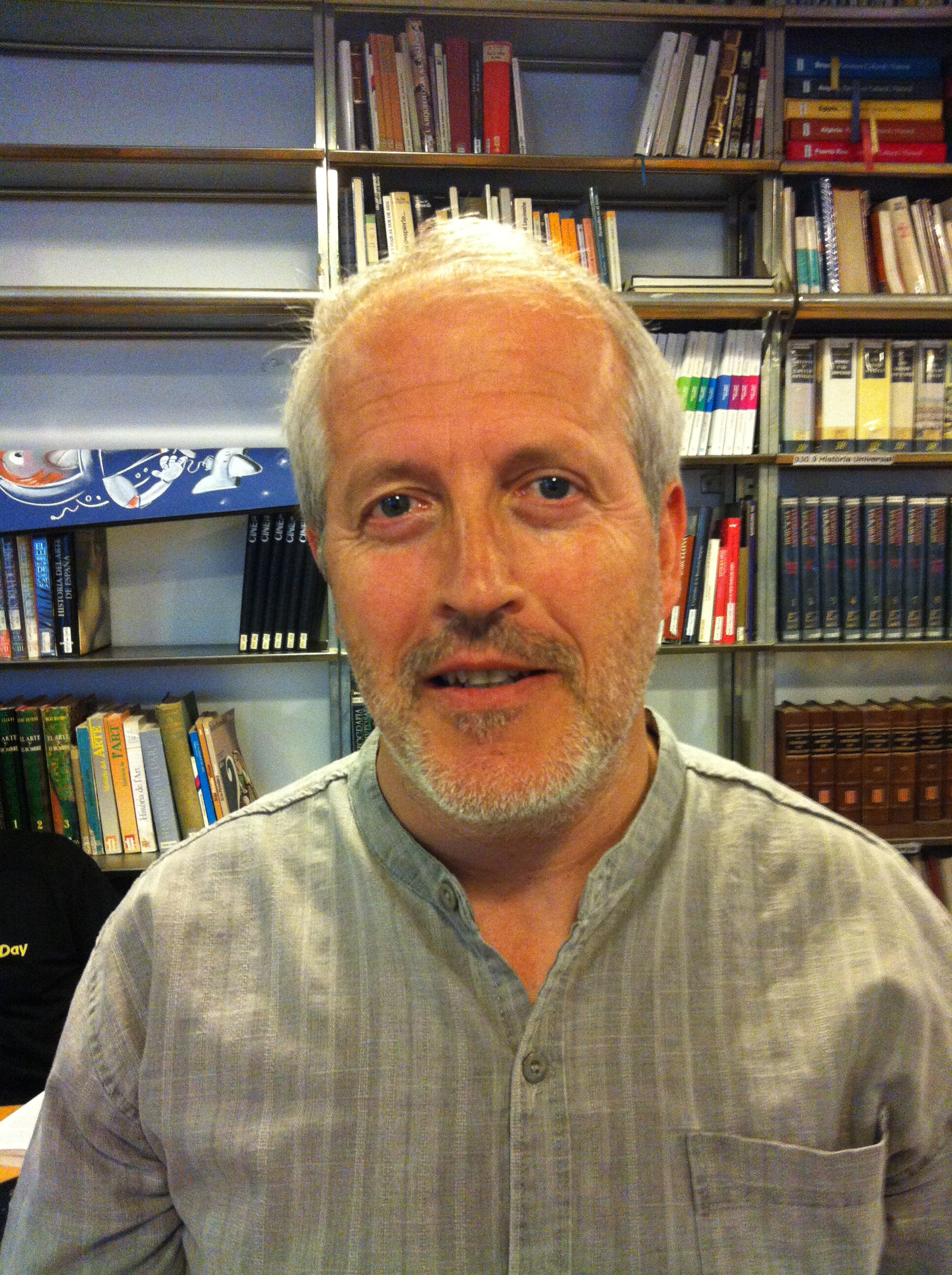 Xavier González Alemany Alcalde de La Palma de Cervelló